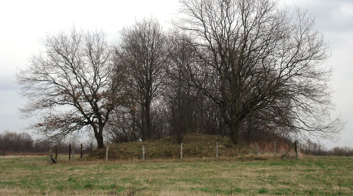 Langbett Langenrehm aus Westen